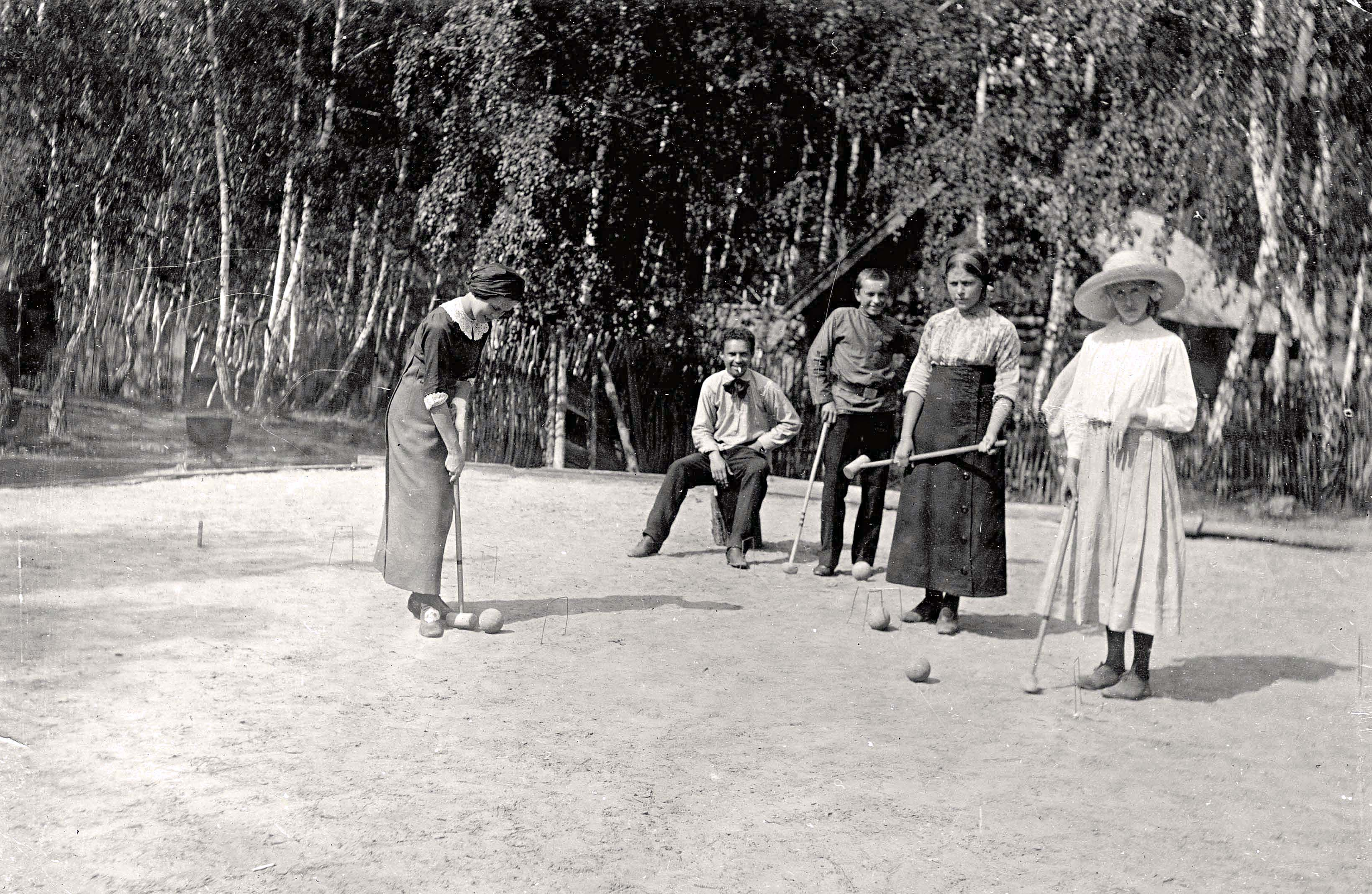 Игра в крокет на даче врача П. Н. Коновалова (1910-е): Окрестности Красноярска (Тараканово), 1910-е годы, лето. Снимок сделан на площадке для игры в крокет, на фоне березовой рощи. Среди берез виден бревенчатый домик, огороженный тыном. Справа первая стоит Женя Коновалова, дочь известного в Красноярске врача П.Н. Коновалова. Стоит анфас, в правой руке - молоток. Одета в светлую блузку и юбку, на голове - шляпа. Крокет - игра спортивного типа, в которой участвуют от 2 до 8 человек, разбиваемых на 2 партии, проводится на ровной земляной площадке (длиной 8-10 м. и шириной 3-5 м), на которой устанавливаются в определенном порядке ряд проволочных ворот и два колышка. Задача игроков - провести ударом деревянного молотка свой деревянный шар последовательно через все ворота от своего колышка к колышку противника и обратно. В ХIХ в. крокет был распространен главным образом, как средство отдыха и развлечения.